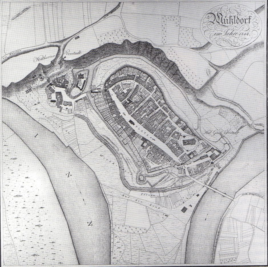 Ortsblatt von Mühldorf aus dem bayerischen Flurkartenwerk von 1814